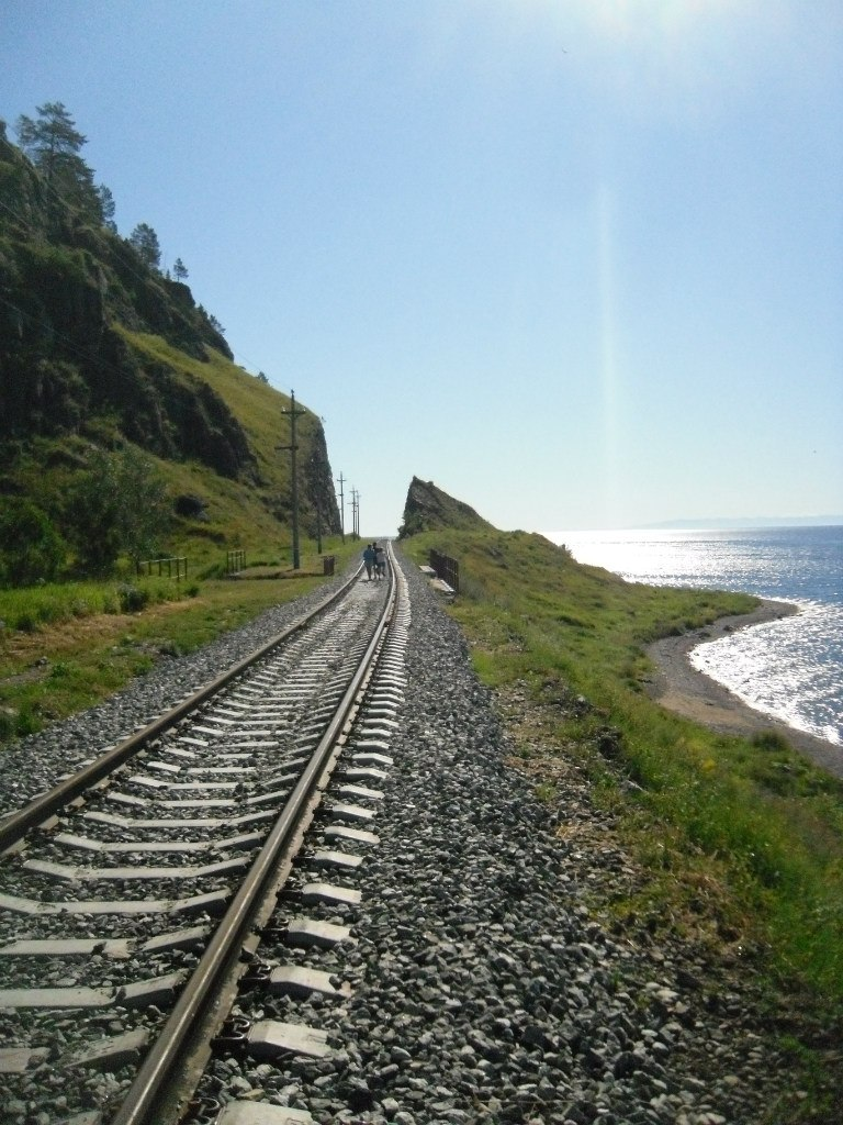 Кругобайкальская железная дорога, Слюдянский район This image is related to the protected area of Russia number 3810340